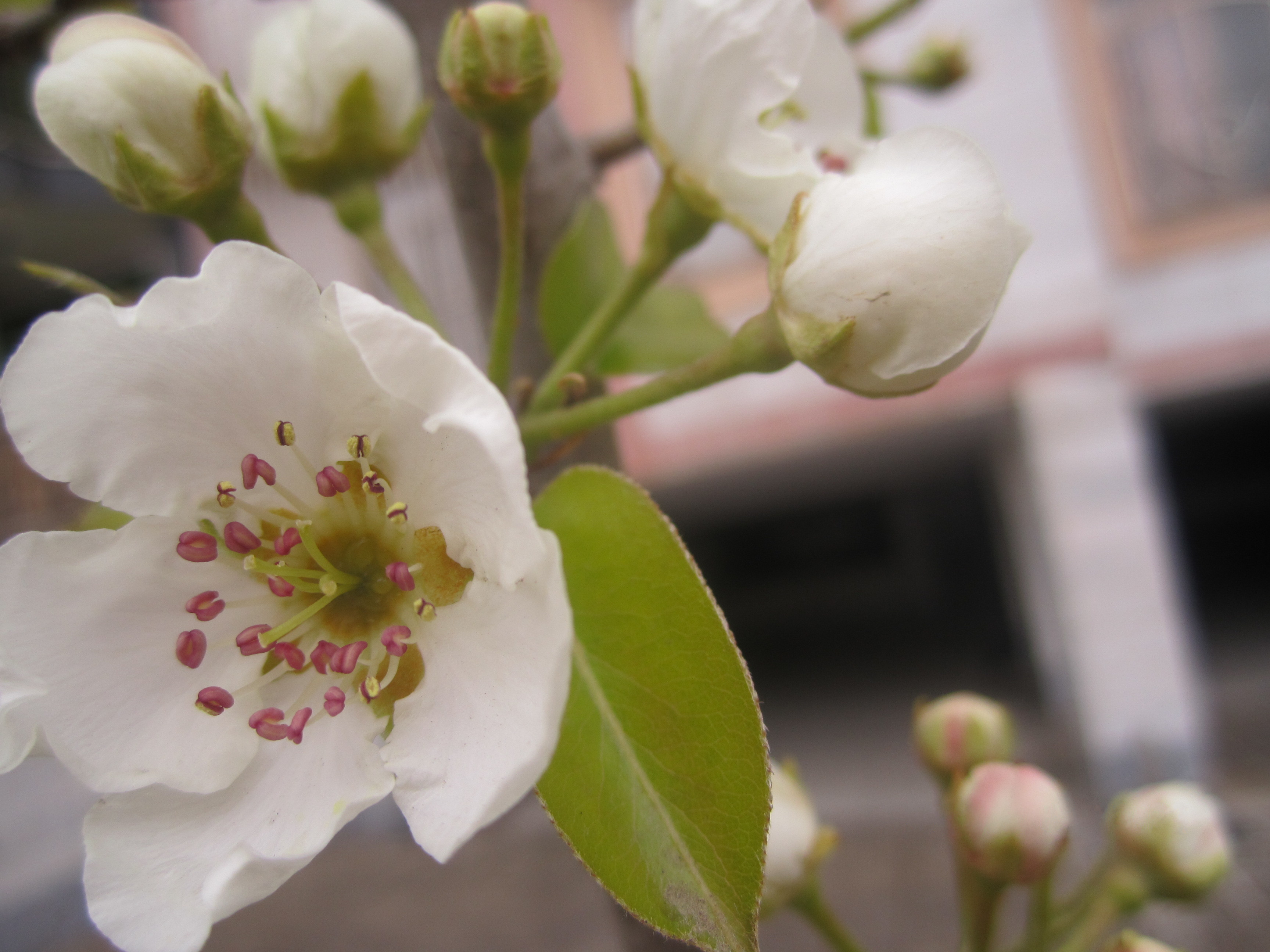 شکوفه گلابی